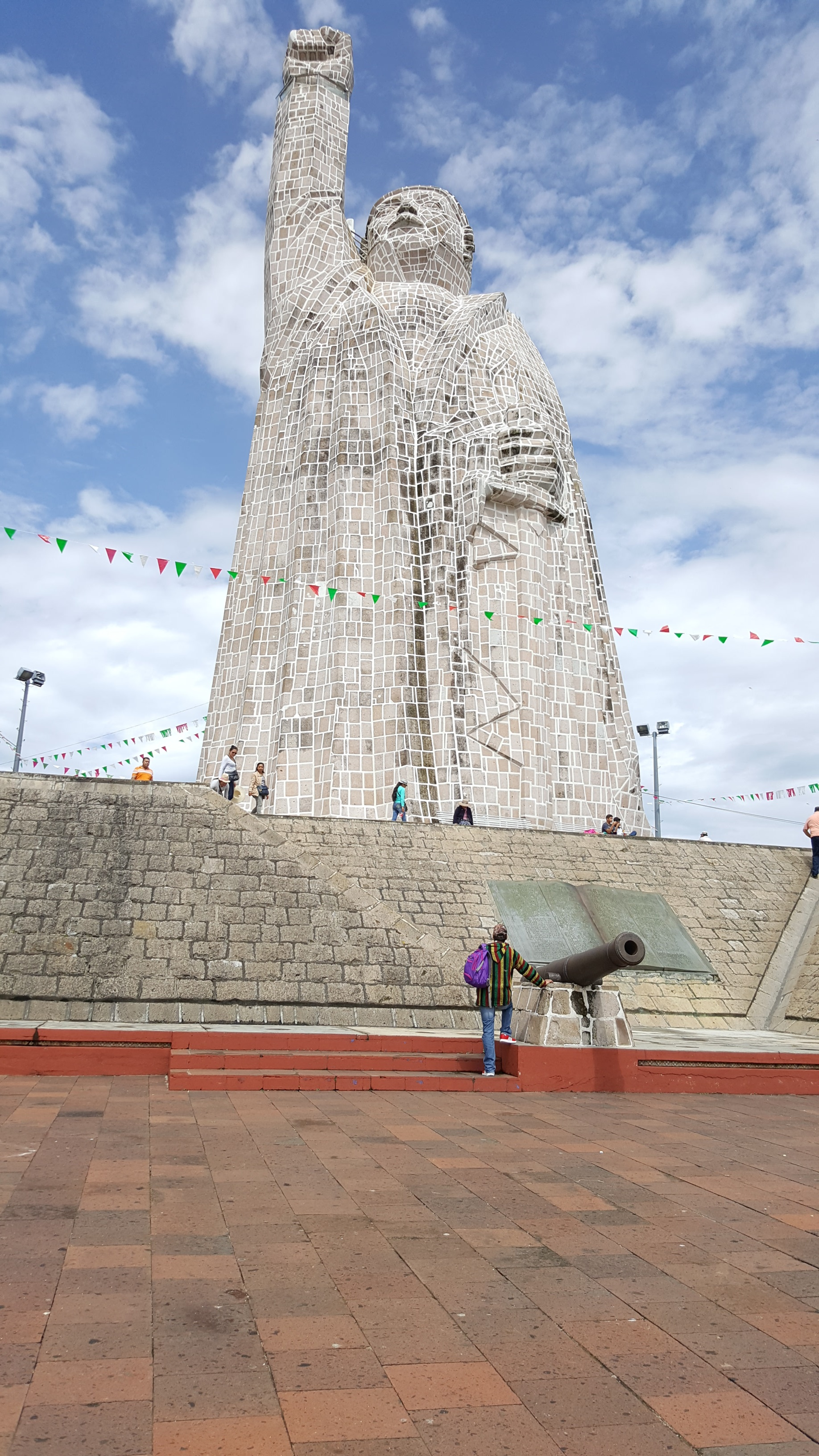 Vista desde lo alto del Monumento a José María Morelos en la Isla de Janitzio